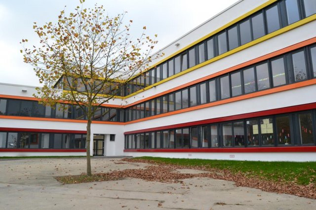 IKG Dortmund nach der Sanierung